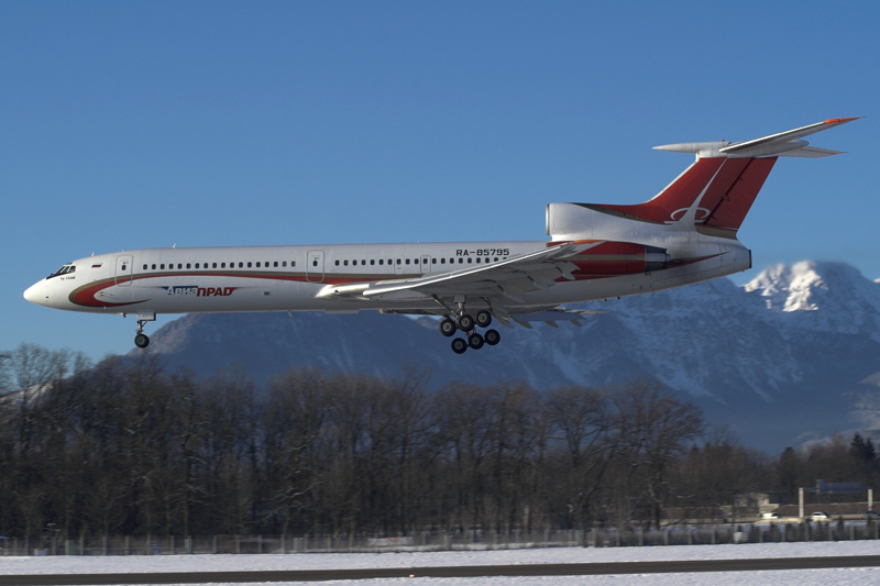 RA-85795, Aviaprad Tupolev TU-154M RA-85795 at Salzburg